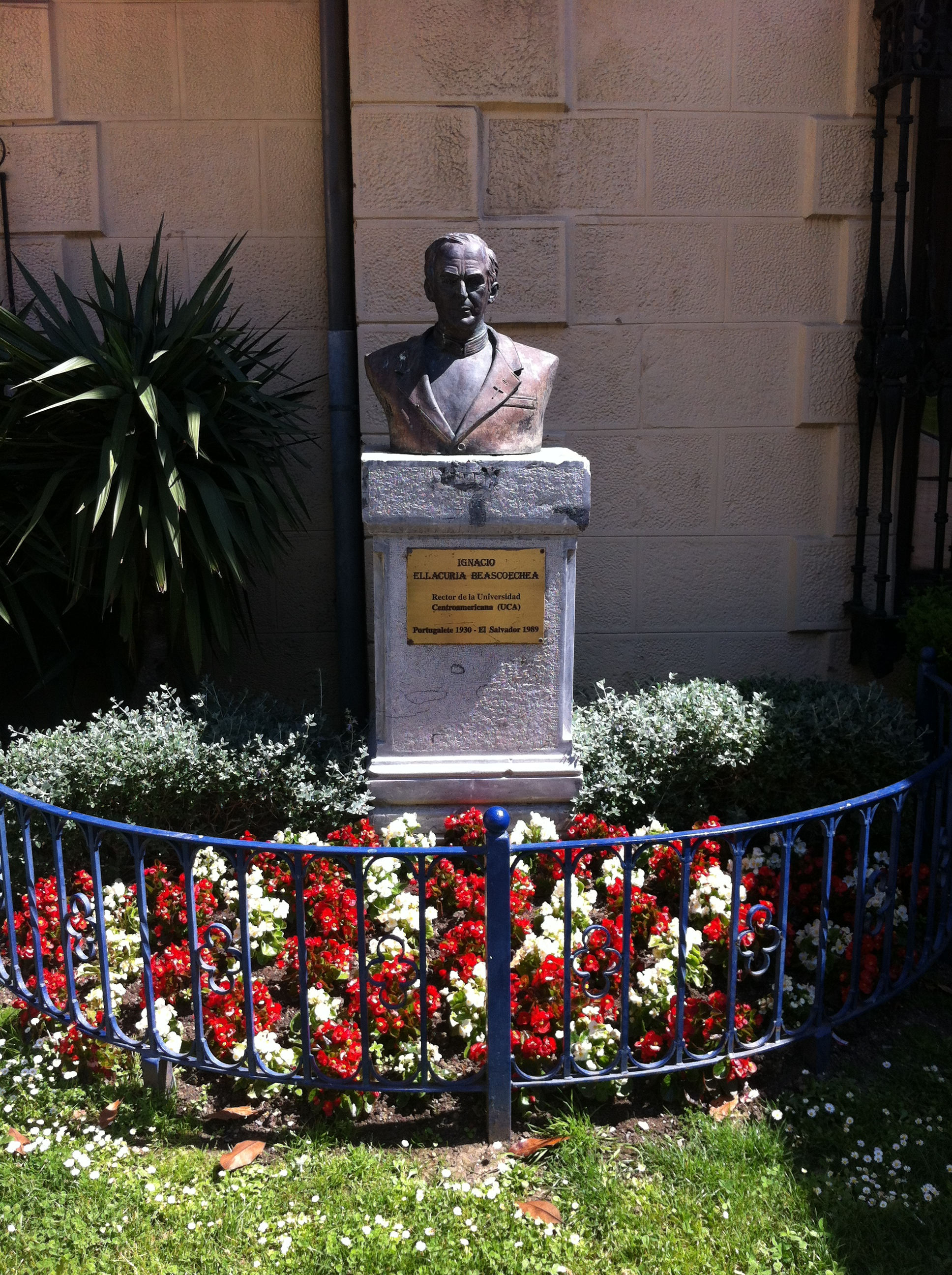 Estatua de Ignacio Ellacuria Beascoechea (Portugalete 1930 - El Salvador 1989), Rector de la Universidad Centroamericana. La estatua se encuentra ubicada en la entrada de la UNED Bizkaia (Portugalete).